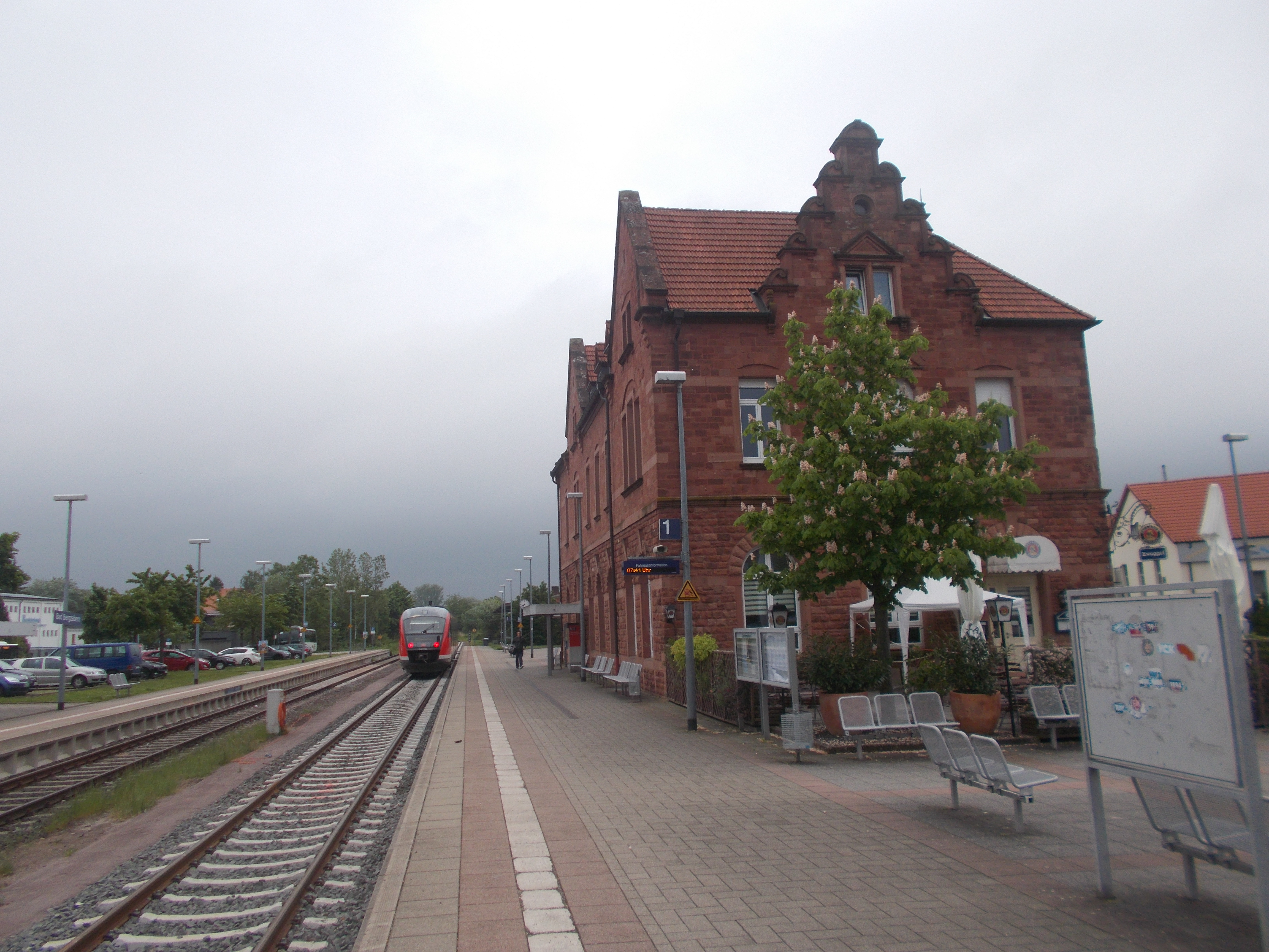 späthistoristischer Sandsteinquaderbau, Renaissancemotive, Turm, um 1890/1900, Endpunkt der Strecke Winden-Bad Bergzabern